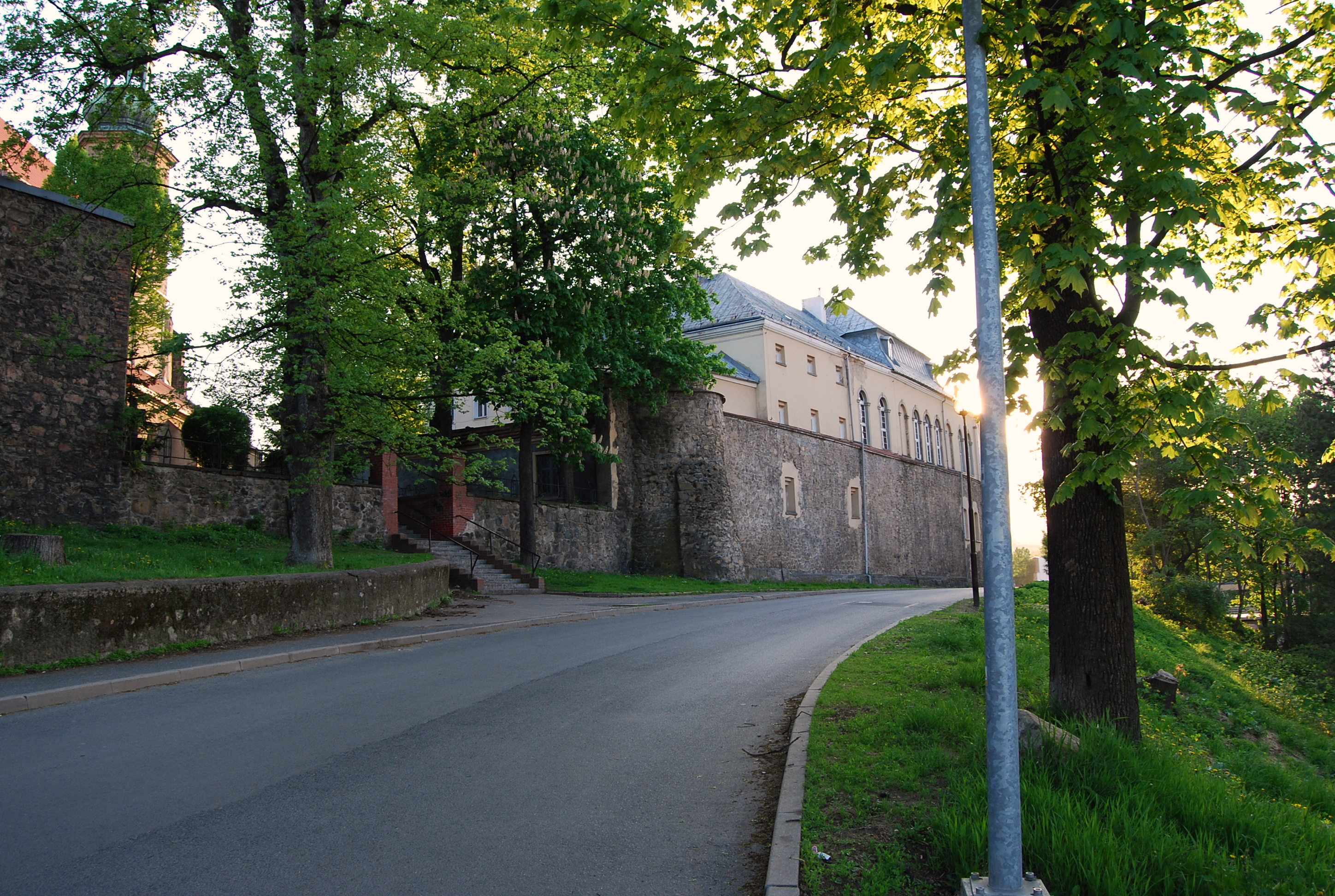 mury obronne XV w., Jelenia Góra